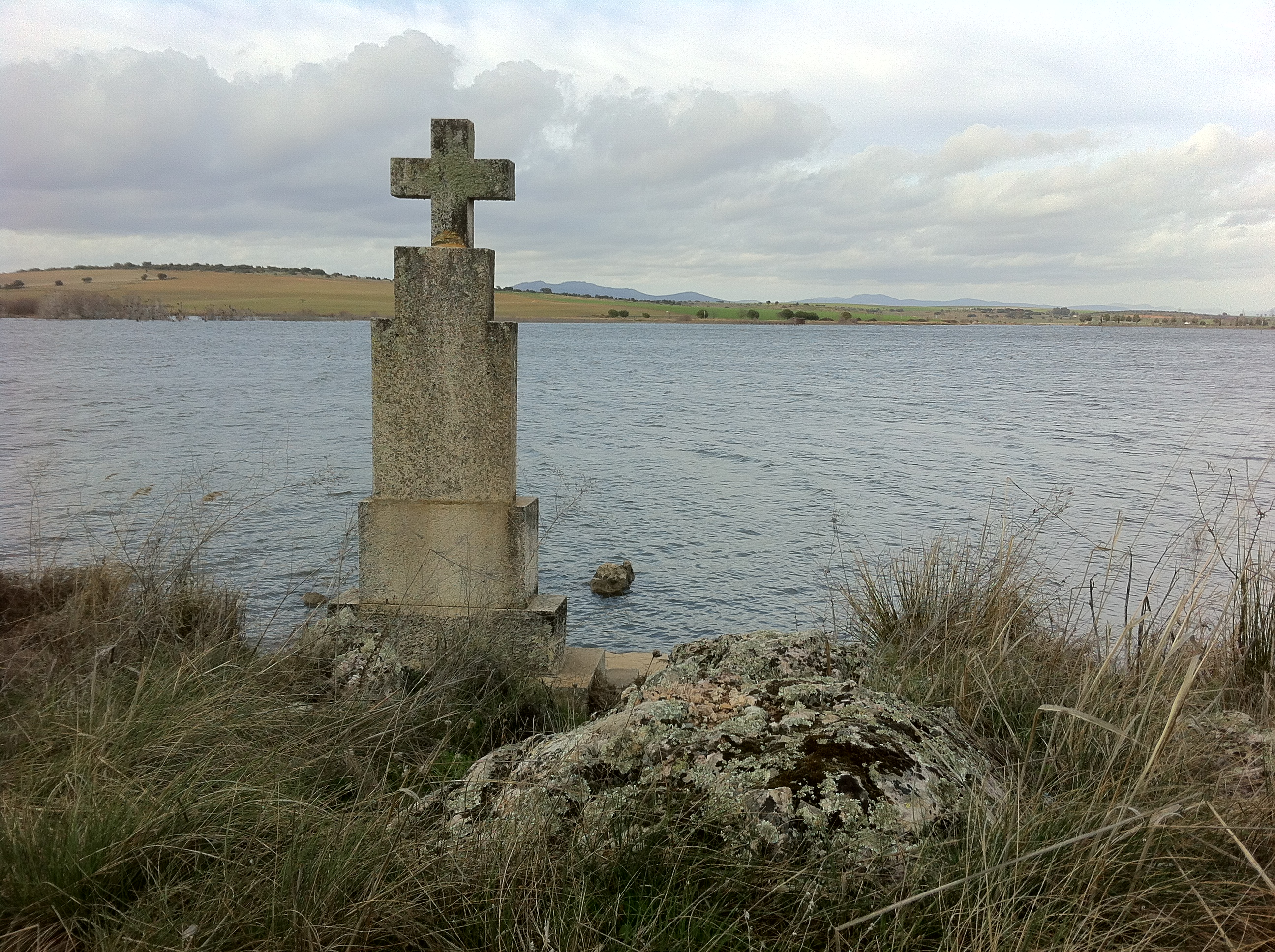 Cruz del obispo Esténaga, en Peralvillo Bajo (Miguelturra, Ciudad Real) a orillas del río Bañuelos, en el embalse de El Vicario.